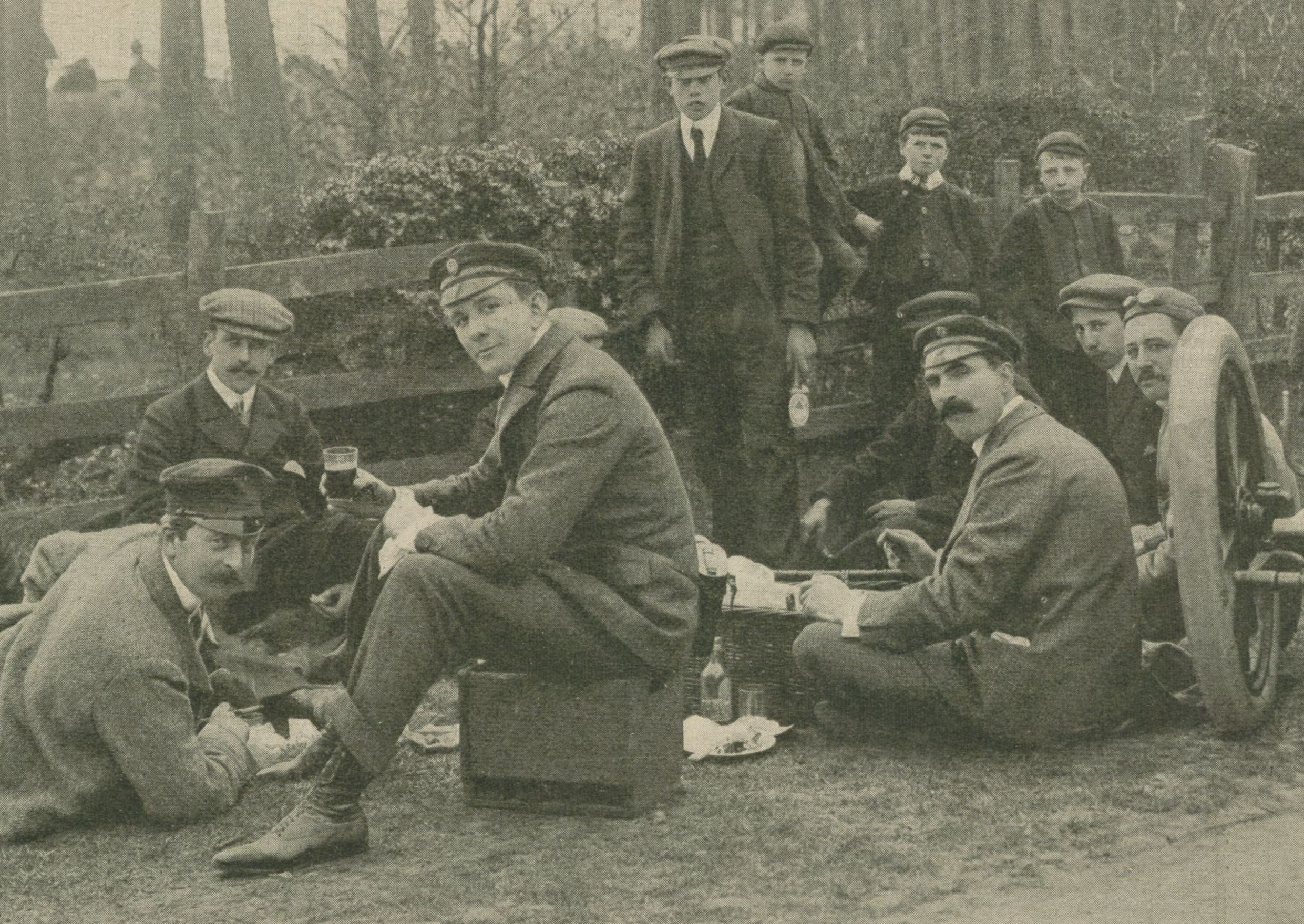 Équipe anglaise Napier en reconnaissance pour la coupe Bennett 1903 (1er plan G. à D. J.W. Stocks, Charles Jarrott, et Selwyn F. Edge) - La Vie au Grand Air du 19 juin 1903, p.409